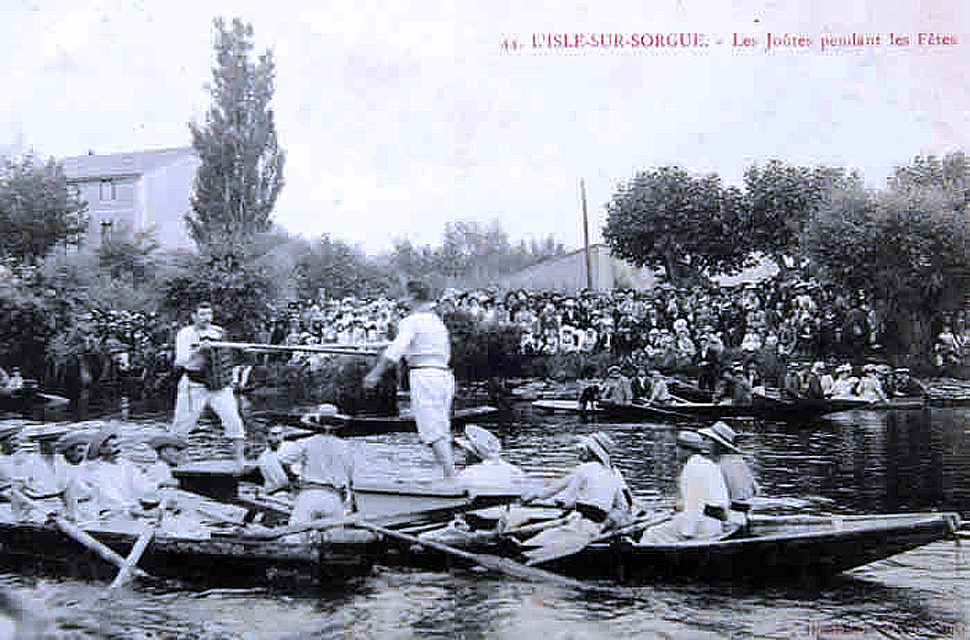 Les joutes sur la Sorgue, une des tradition nautiques de L'sle-sur-la-Sorgue